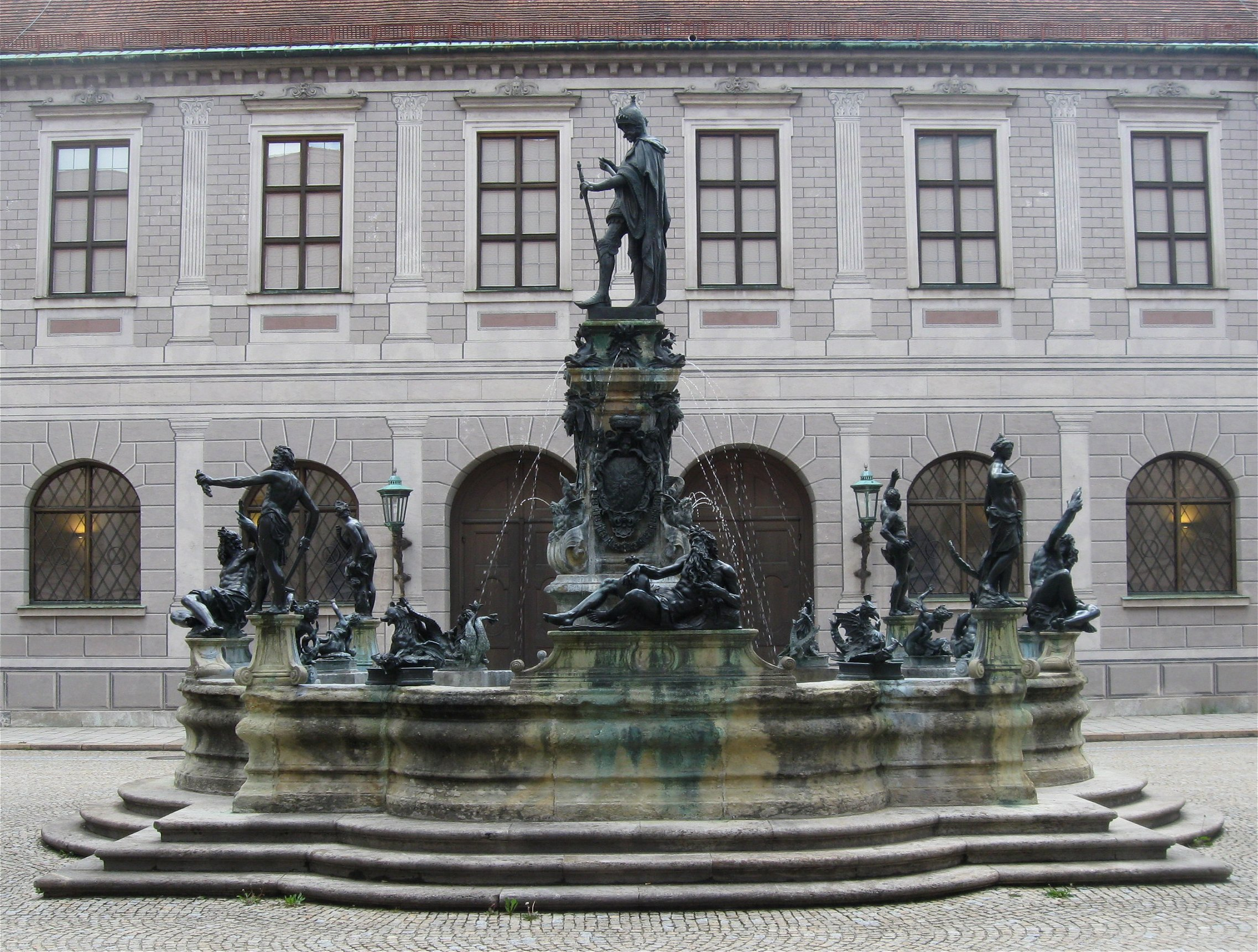 Wittelsbacher Brunnen im Brunnenhof der Münchner Residenz, gestaltet von Hubert Gerhard (Bronzeplastiken) und Hans Krumpper (Ausgestaltung), 1623 fertiggestellt